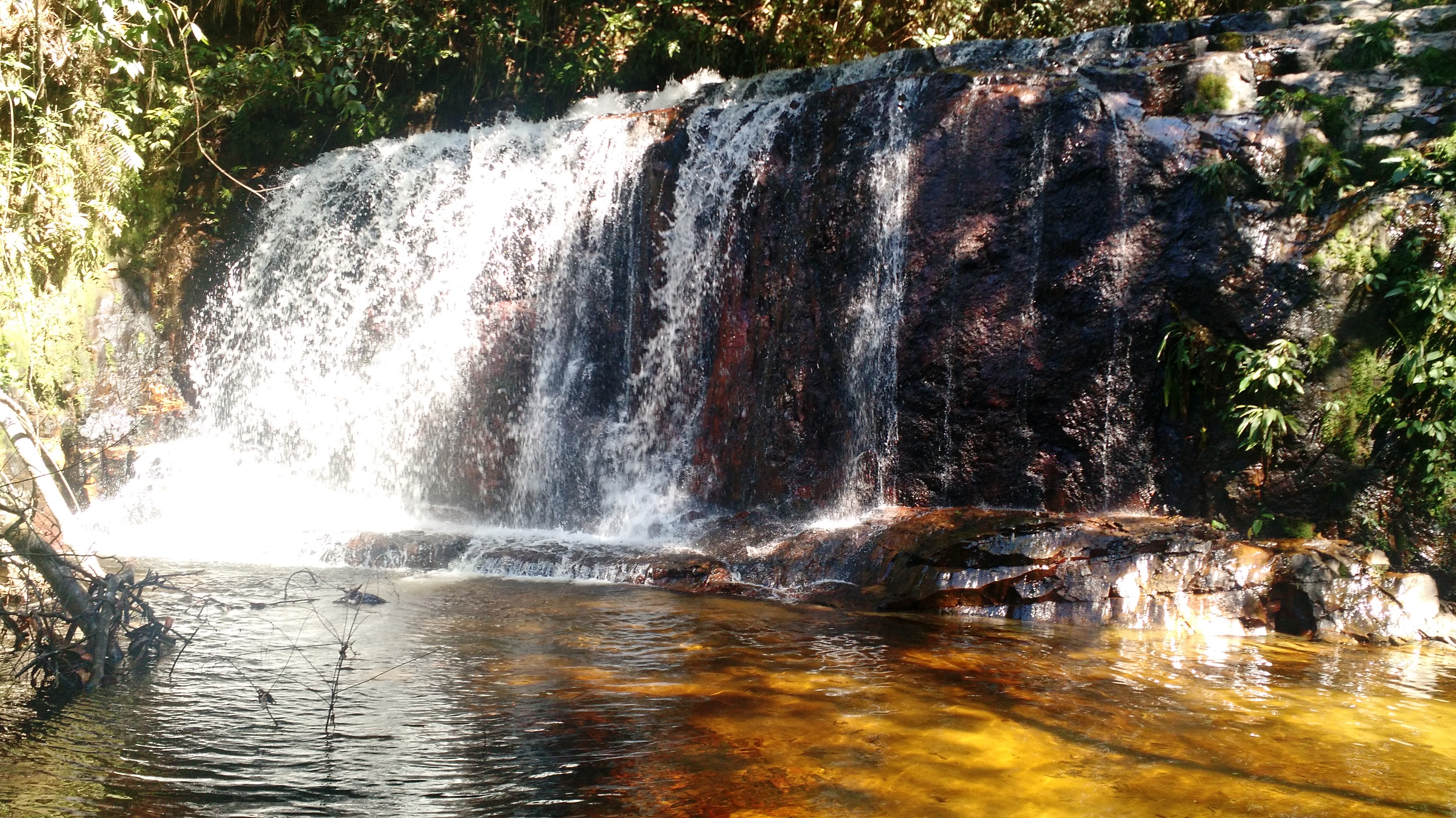 Após 14km de trilha por meio da Floresta Amazônica, a recompensa de uma bela cachoeira.